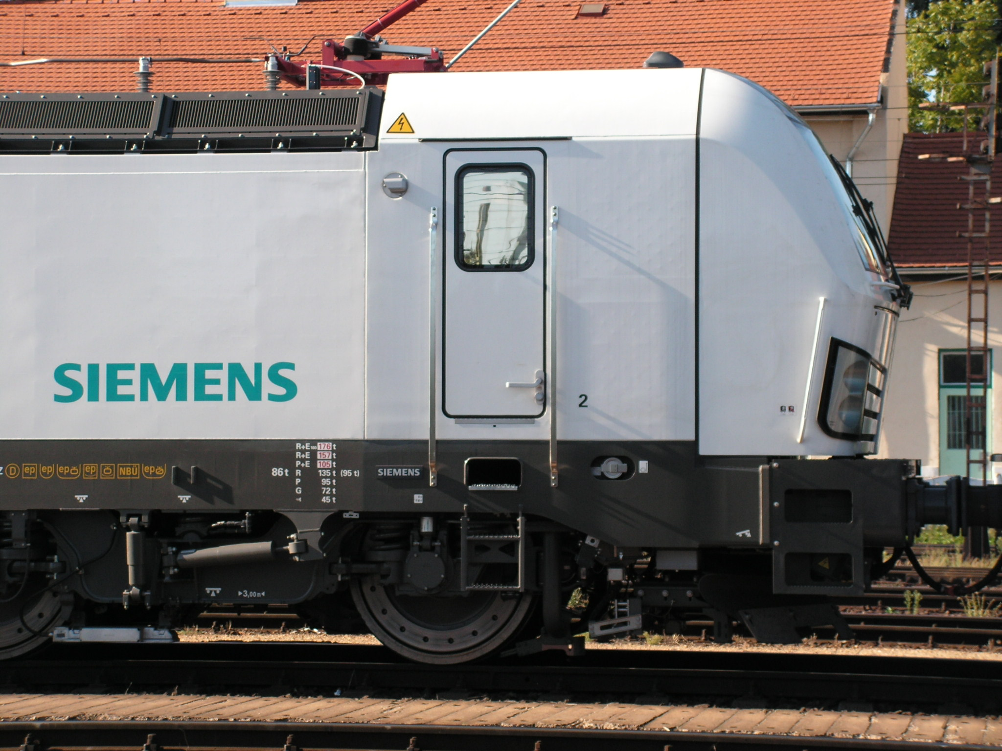 D-Rpool Siemens Vectron Ferencváros pályaudvaron